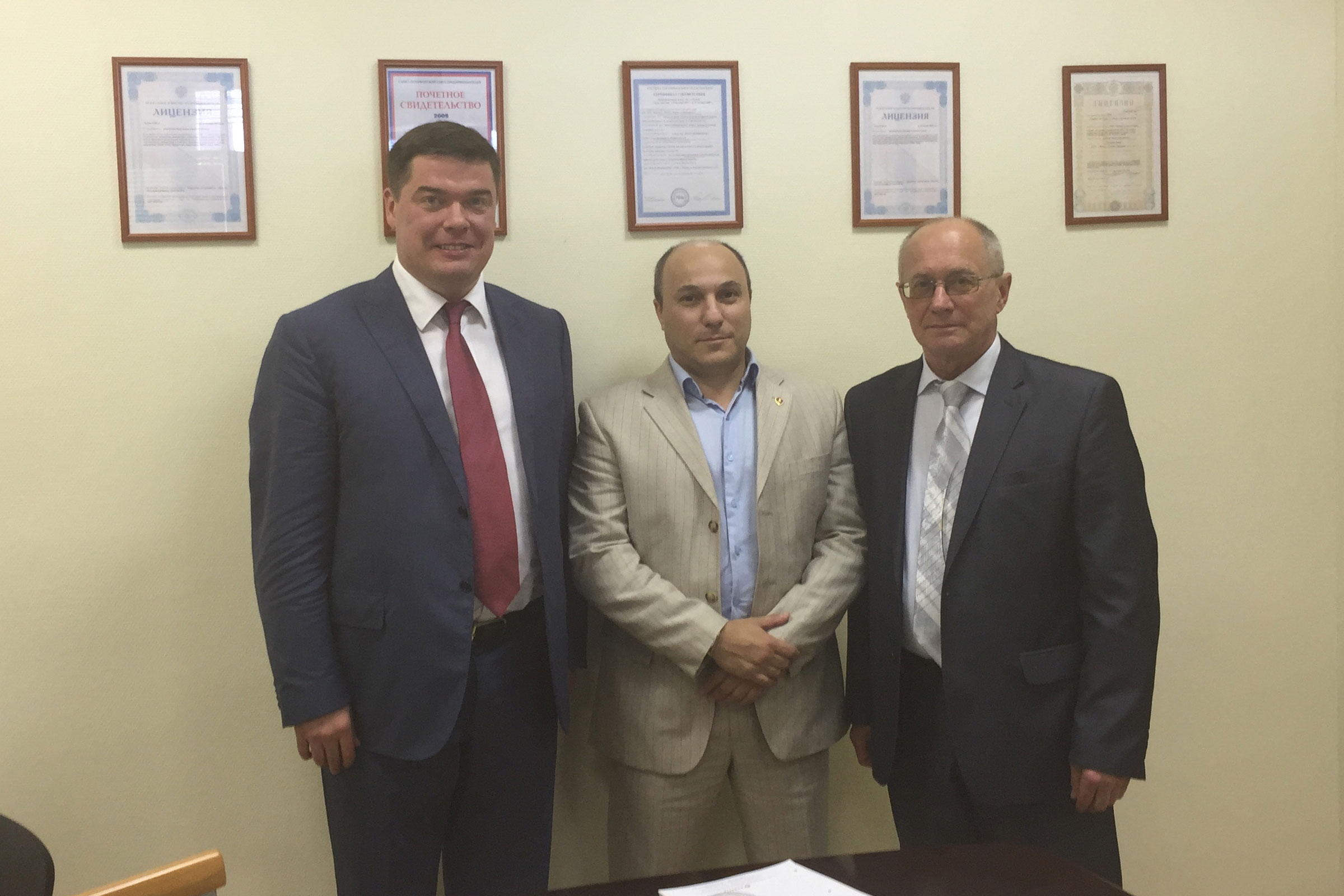 Белая трость Рубикон